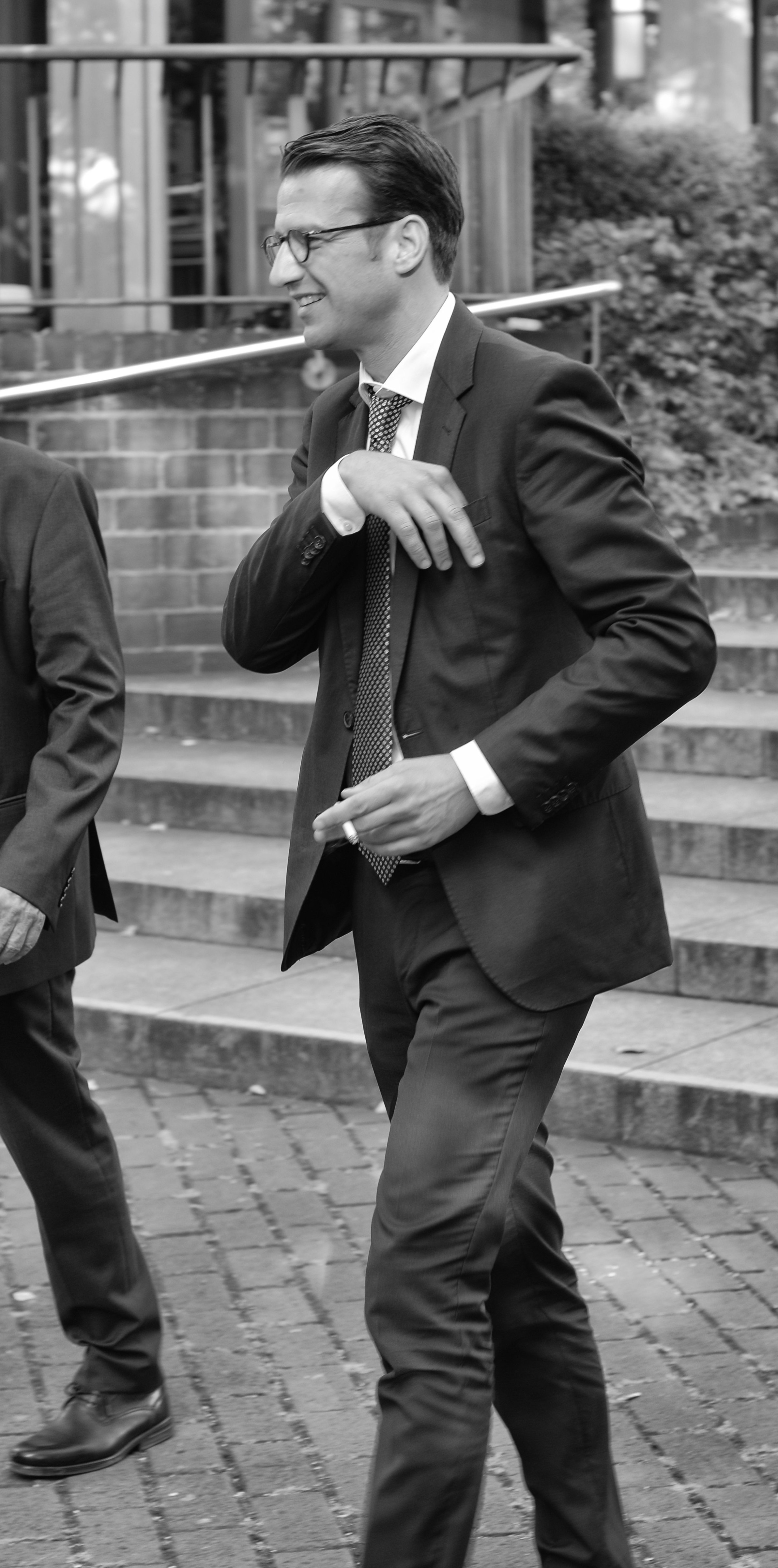 Wolfgang Stahl auf dem Weg ins Strafjustizzentrum München im Herbst 2016